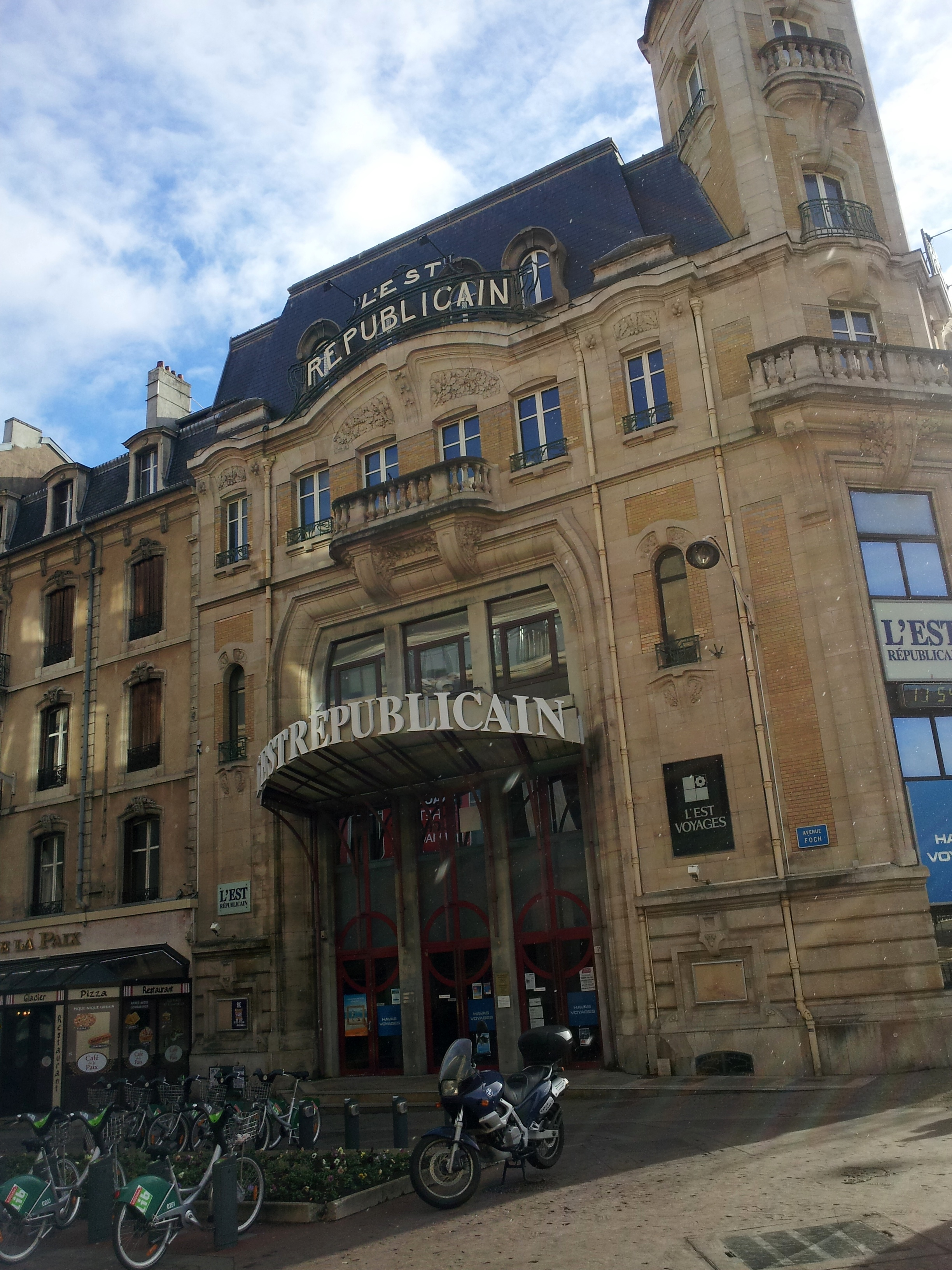 Le Siège du quotidien régional «l'Est Républicain», avenue Foch à Nancy.